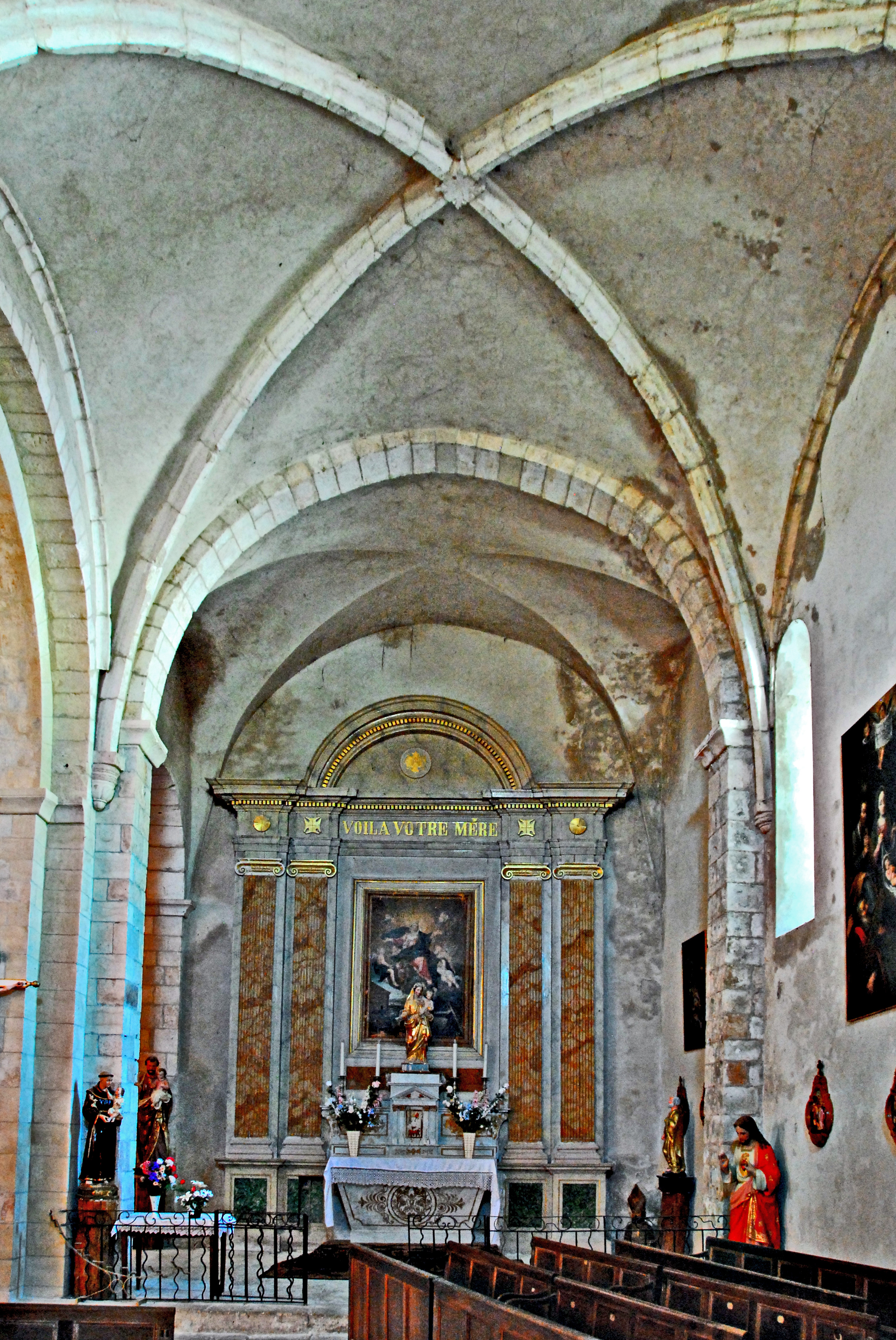 N-D et St-Christophe de St-Christol, Seitrenschiff nach Westen